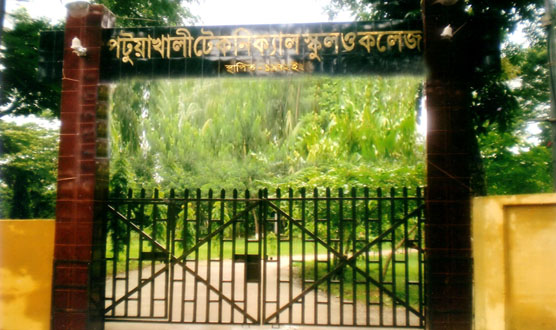 PTSC Gate